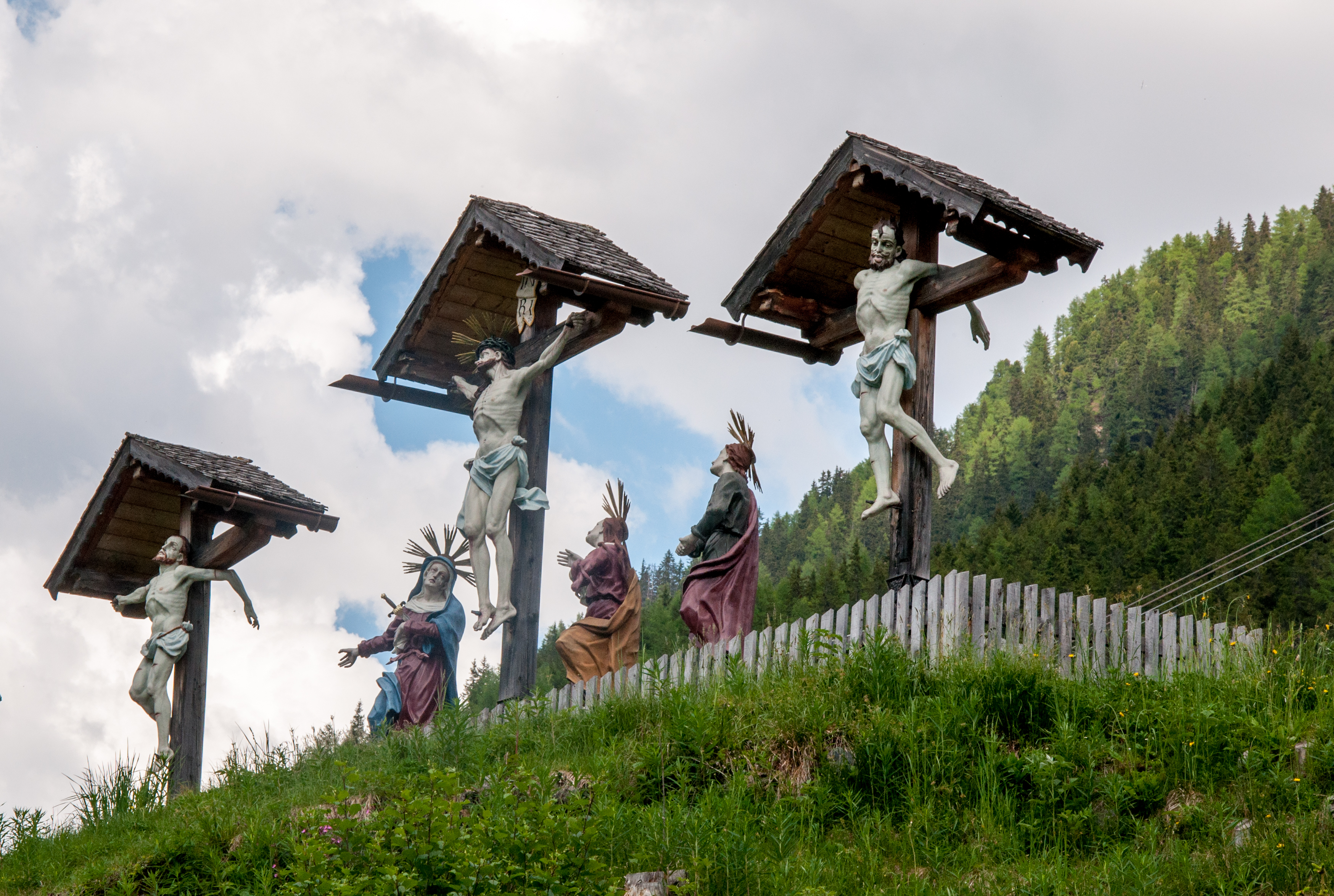 Kalvarienberggruppe und sieben Bildstöcke Ischgl